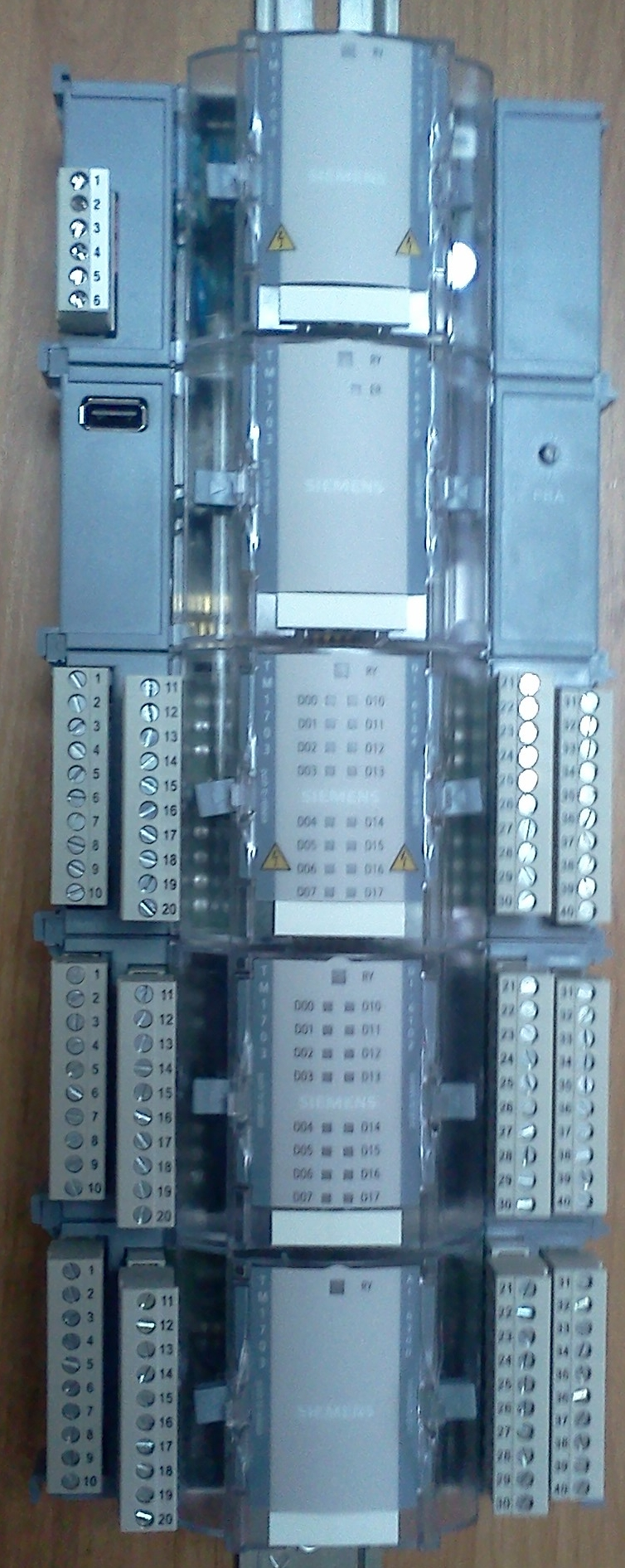 Контроллер Siemens TM1703 (по возможности добавлю фото лучшего качества)